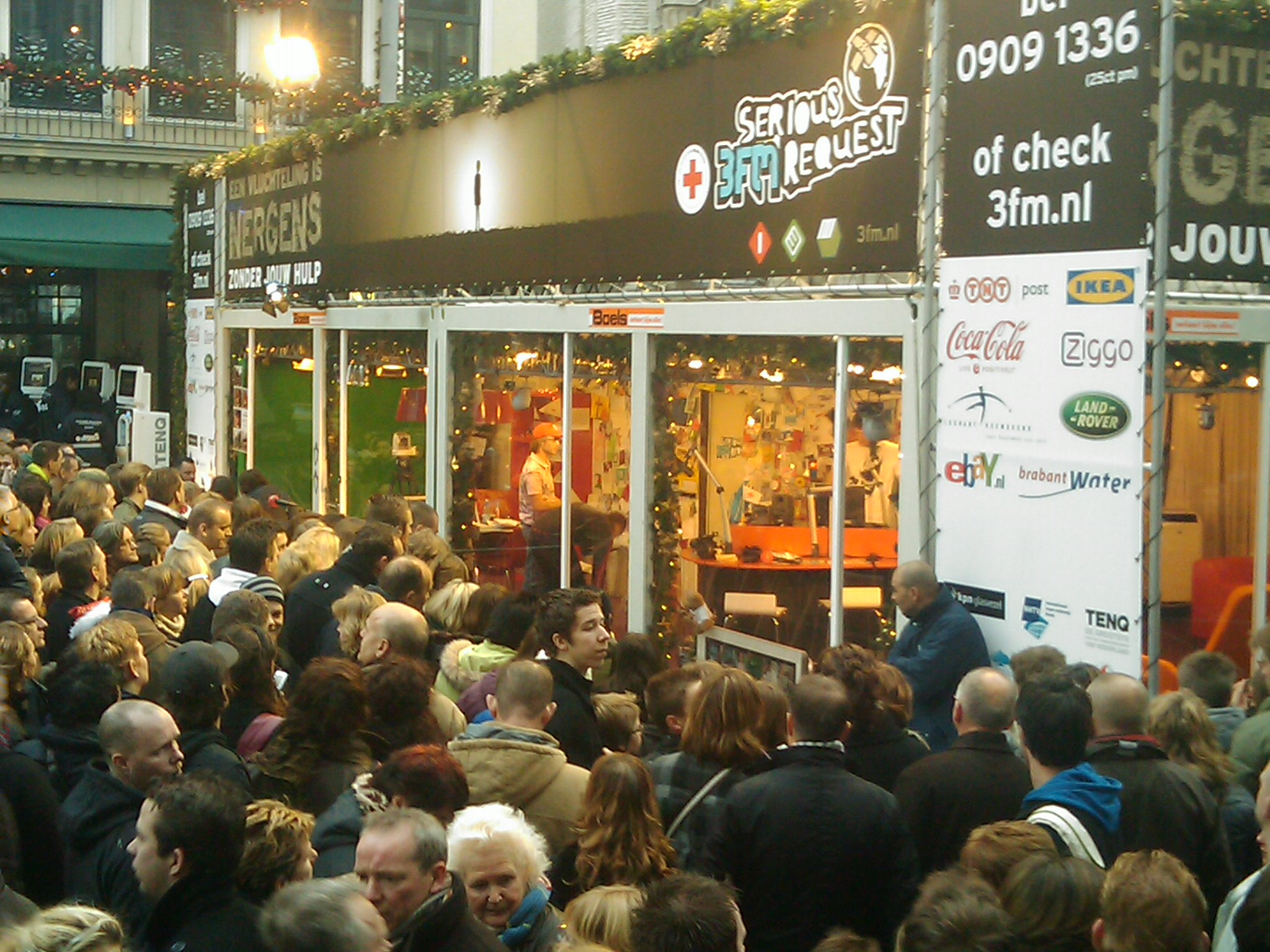 De heren Paul Rabbering, Coen Swijnenberg en Giel Beelen hebben nogal wat bekijks in het Glazen Huis. Hordes mensen lopen te dringen voor een glimp van de heren tijdens Serious Request 2008 in Breda.